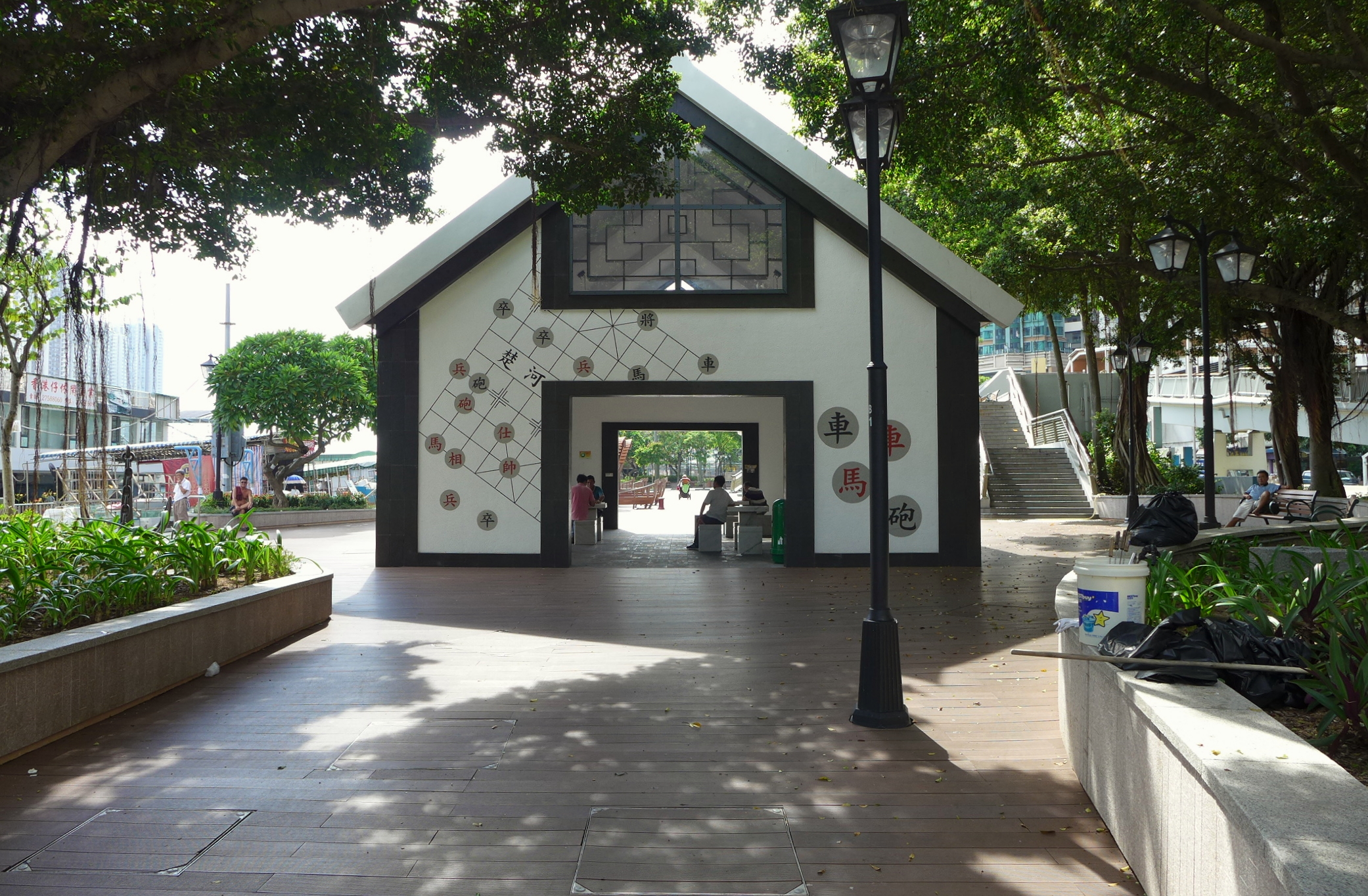 Aberdeen Promenade Chess Pavilion